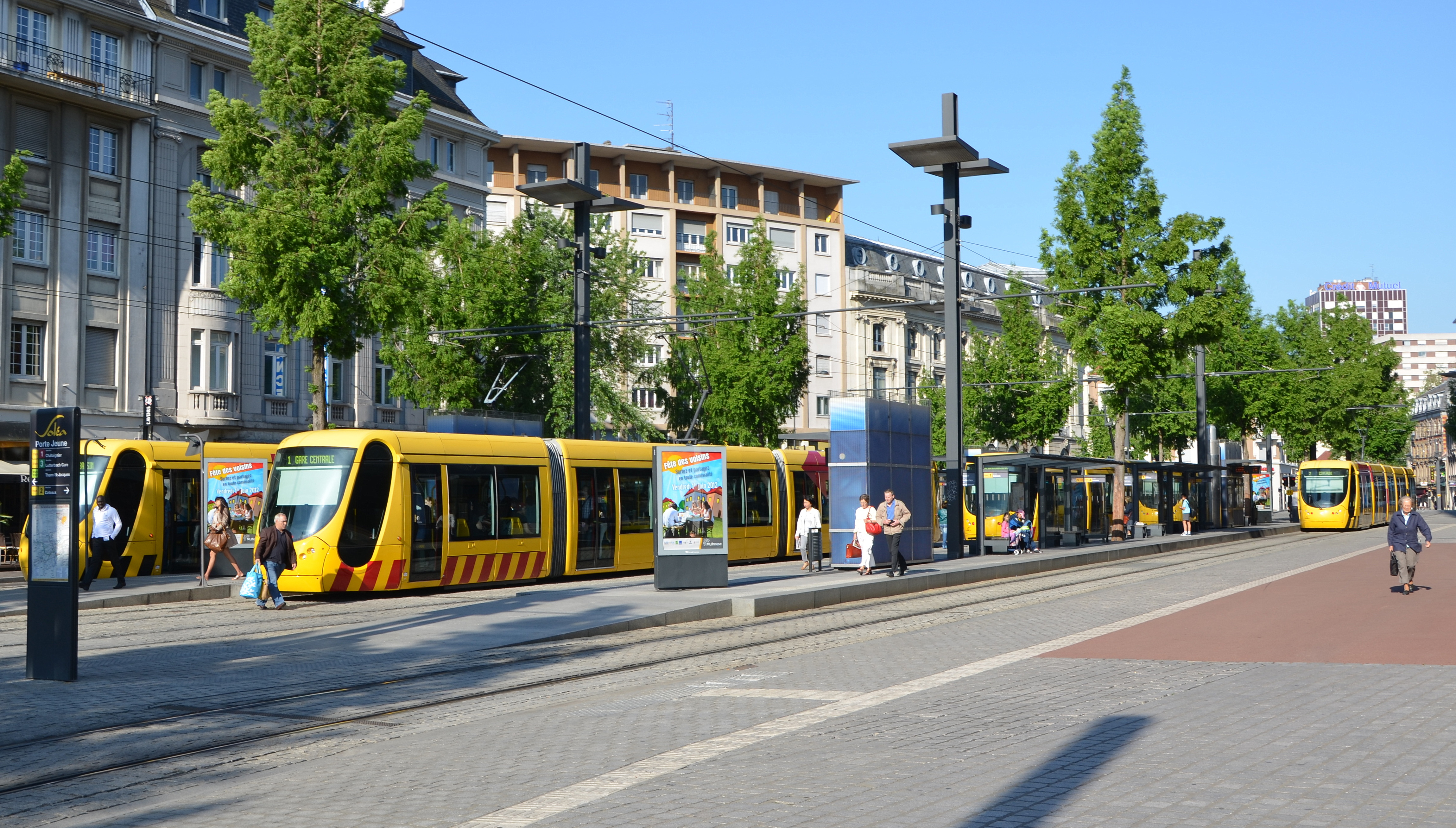 Tramways à la station Porte jeune à Mulhouse, Haut-Rhin, France